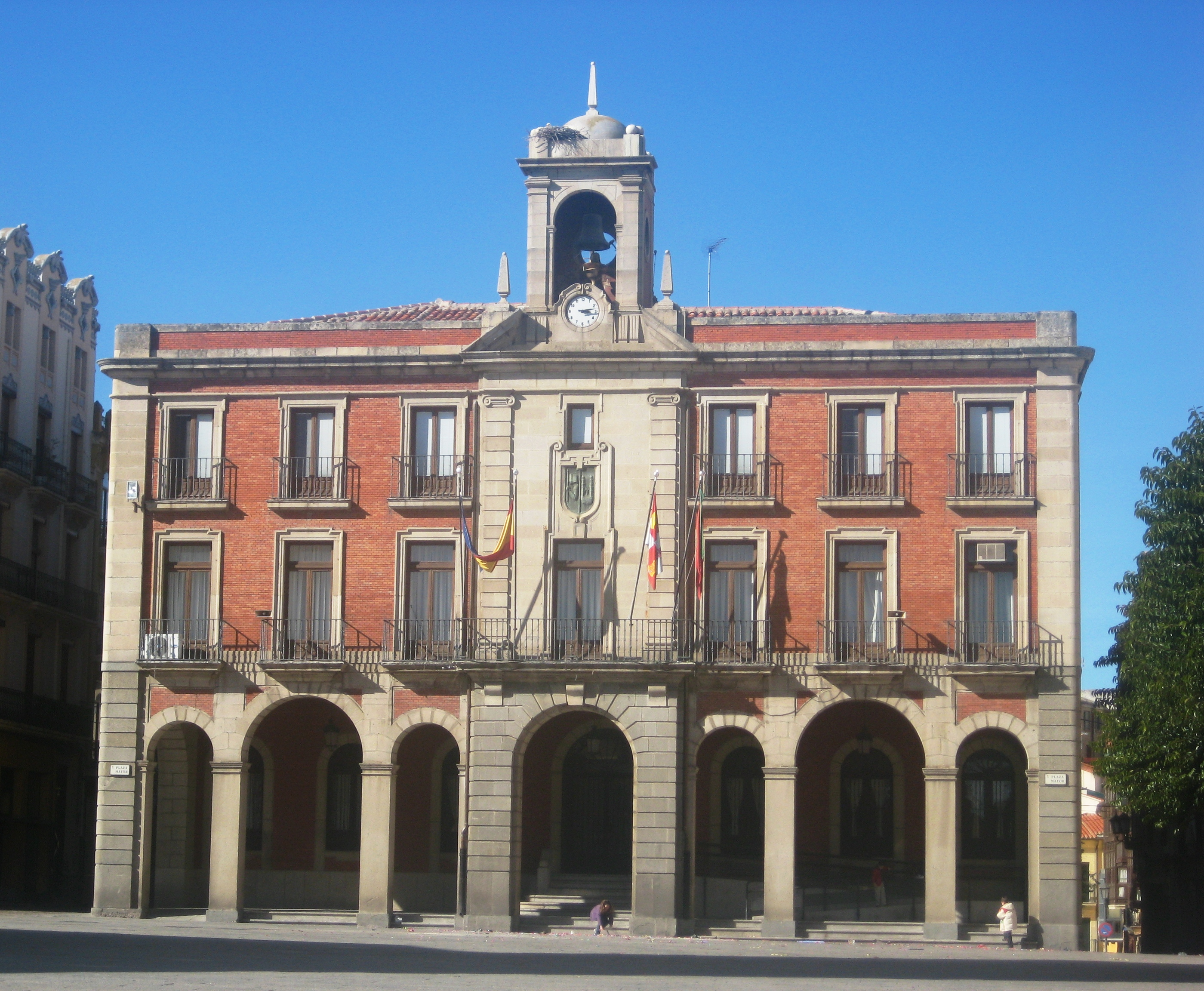 Ayuntamiento Nuevo de Zamora.